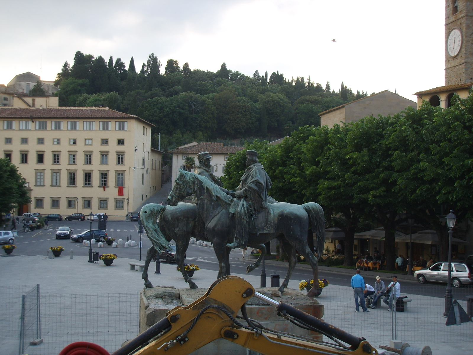 Oreste Calzolari (1852-1920), L'incontro di Teano, monumento bronzeo a Fiesole.